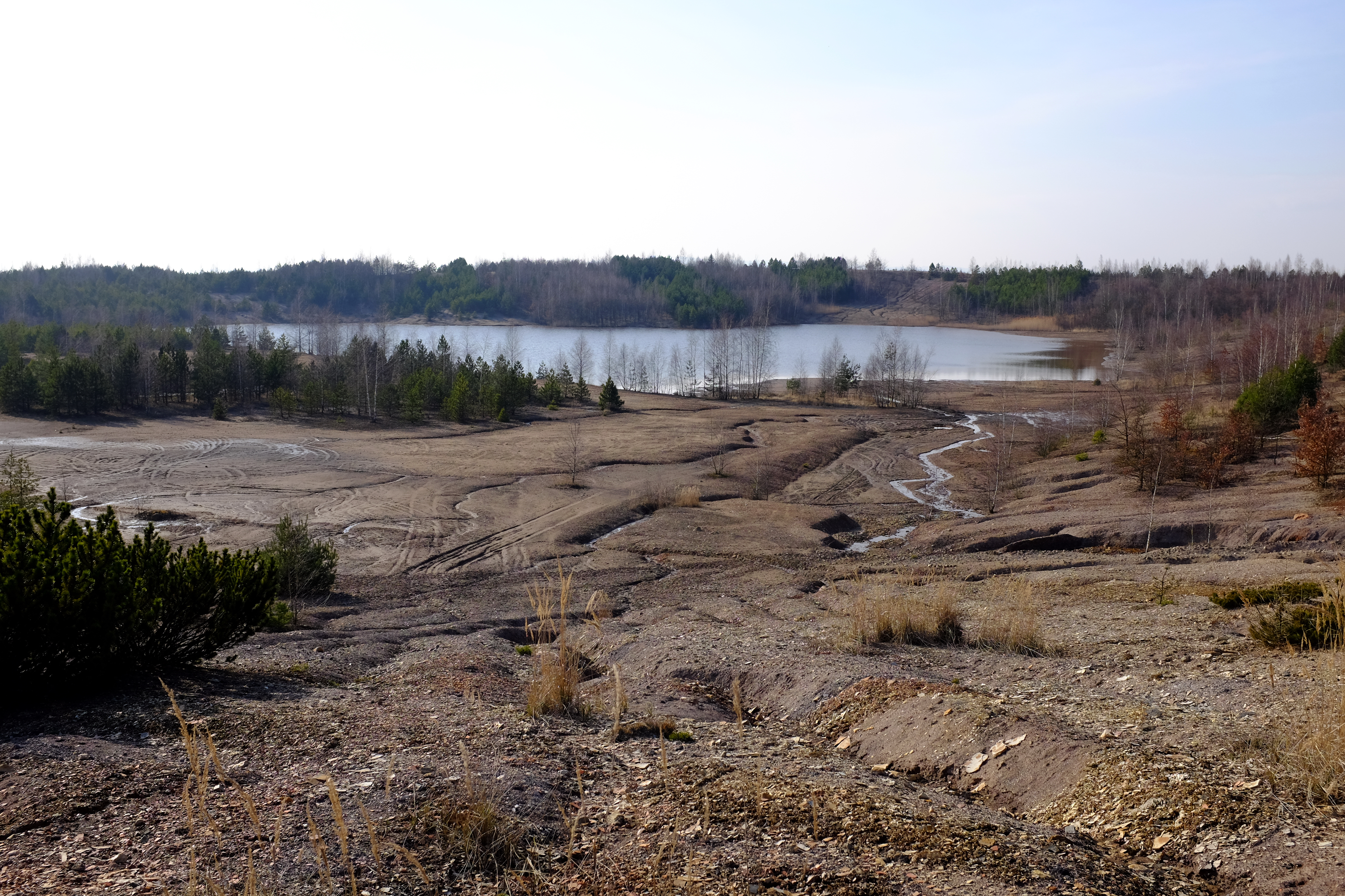 Lítovská výsypka, pohled na jezero na výsypce, okres Sokolov